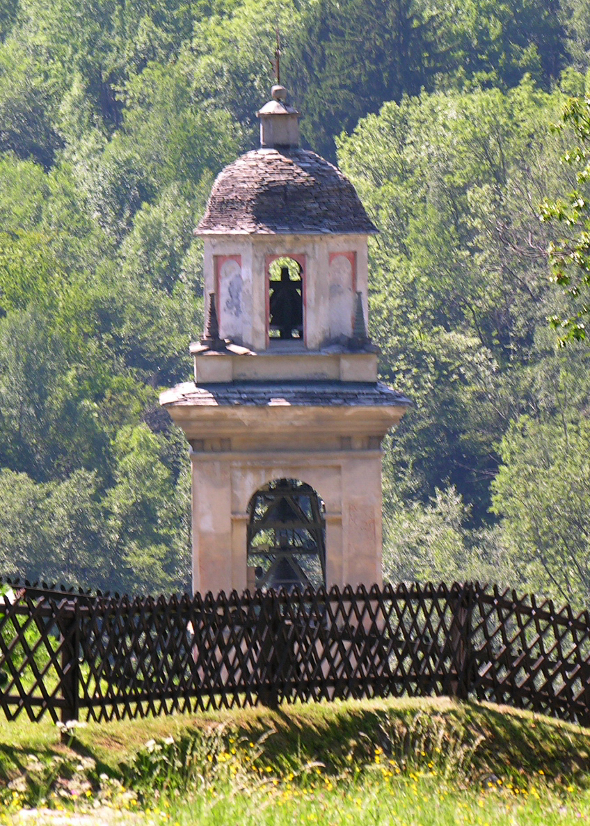 Switzerland, Graubünden, Castasegna